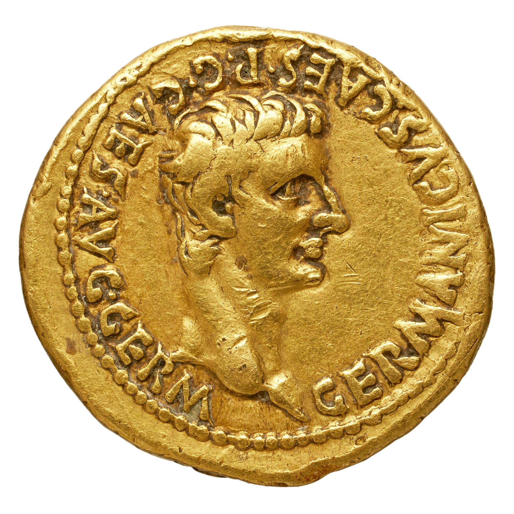 Aureus de Caligula, Revers : GERMANICVS.CAES.P.C.CAES.AVG.GERM. Tête de Germanicus à droite. Atelier de Lyon, 37 ap-J.C. Or, 7,66 gr. Collection BnF : IMP-5841